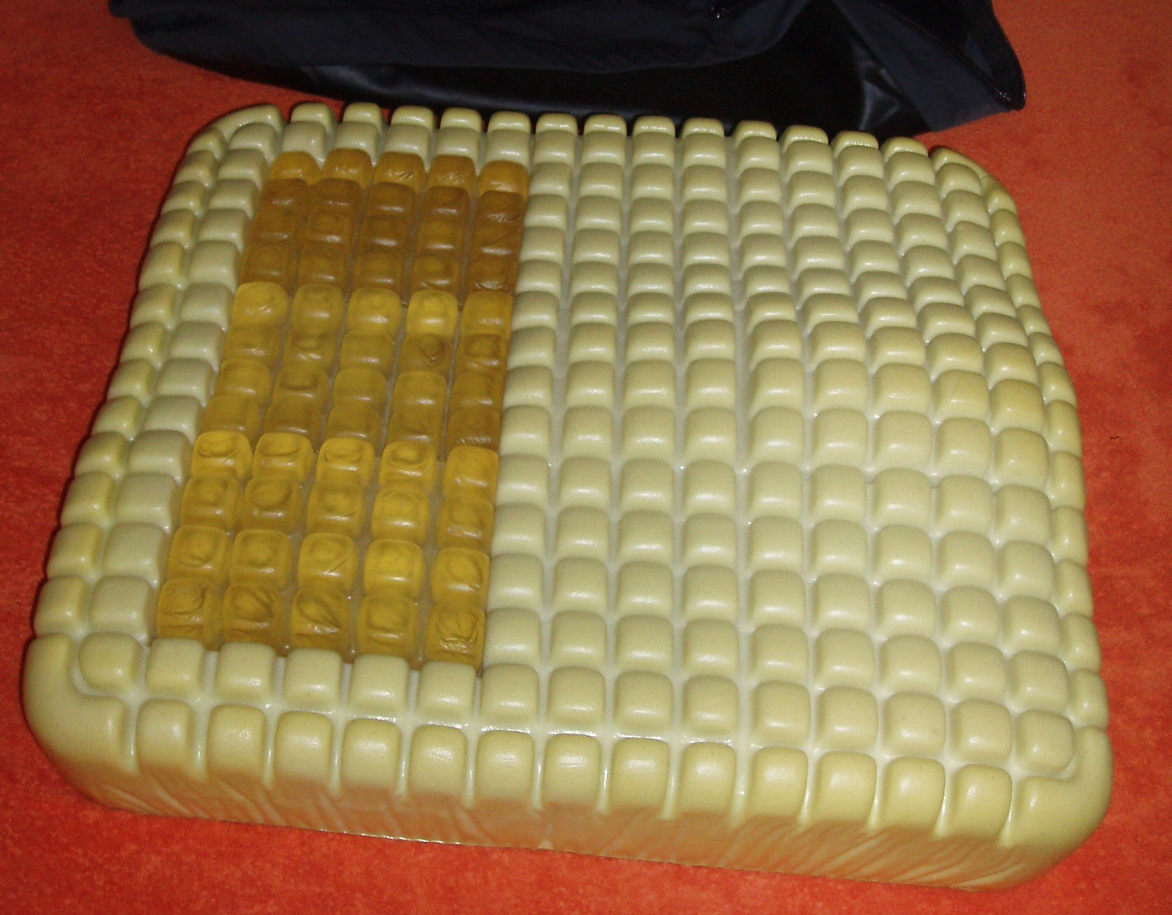 Antidekubituskissen ohne Bezug, von der rechten Seite gesehen. Gelbe Zellen: Gelfüllung, helle Teile: Schaumstoff.